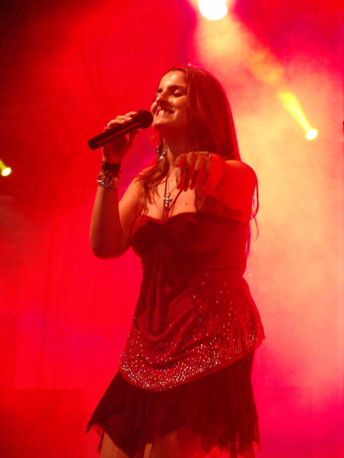 Tiedoston tiedot Kuvaus=Samantha Sayegh Forssan Holjilla kutsulaulukilpailussa vuonna 2006. Lähde=Oma teokseni Päiväys=7.8.2006 Tekijä=Jalo Kotinurmi